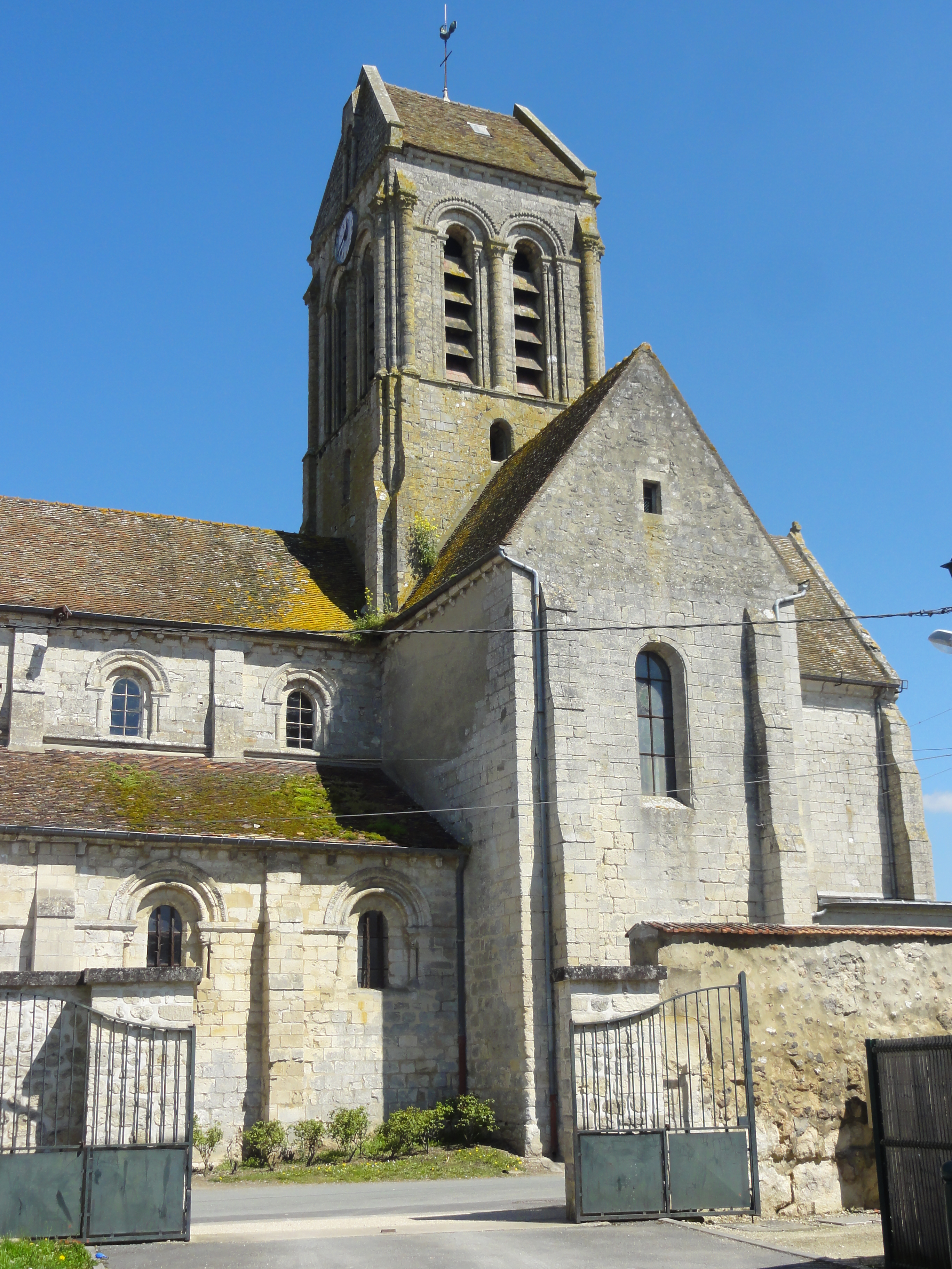 Église Notre-Dame-de-la-Nativité de Lavilletertre - voir titre.